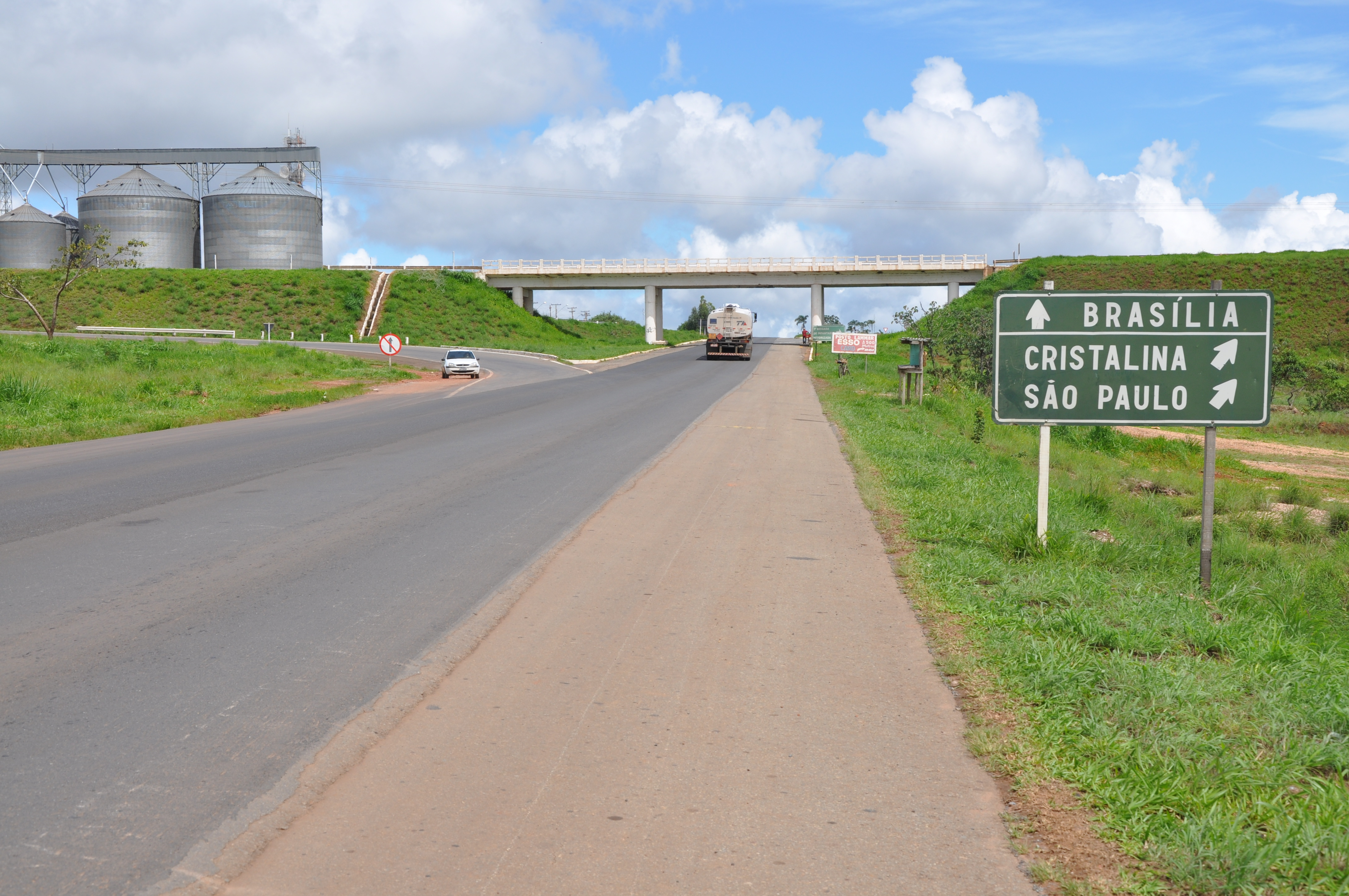 Foto do viaduto da Br 050 sobre 040 em Cristalina.